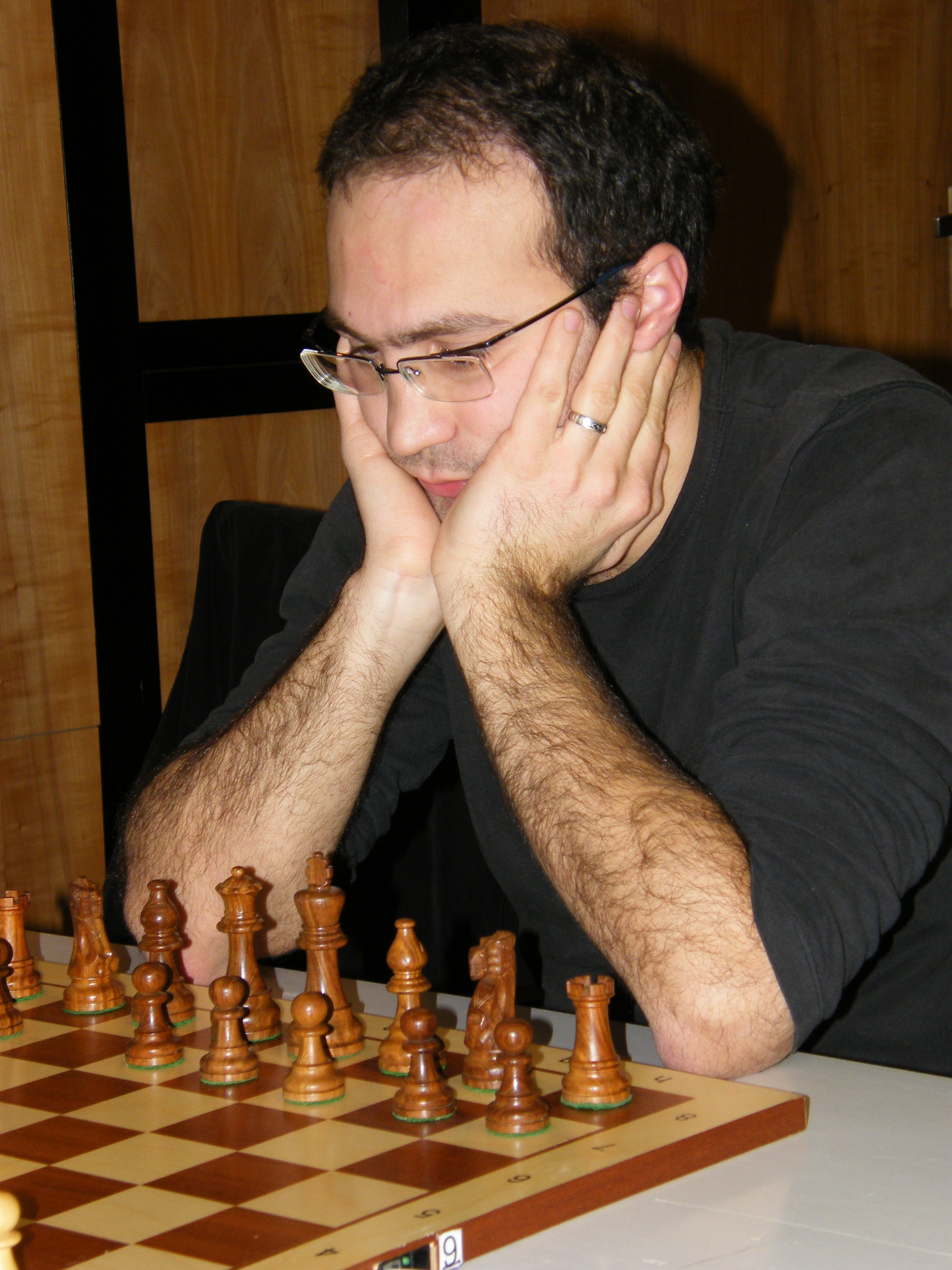 Davit Shengelia bei der 3. Runde der Schach-Bundesliga 2008/09 im Rathaus Schöneberg in Berlin